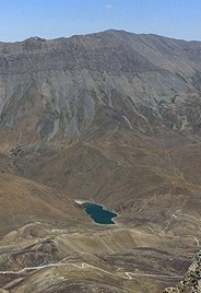 ارتفاعات زرینکوه دماوند